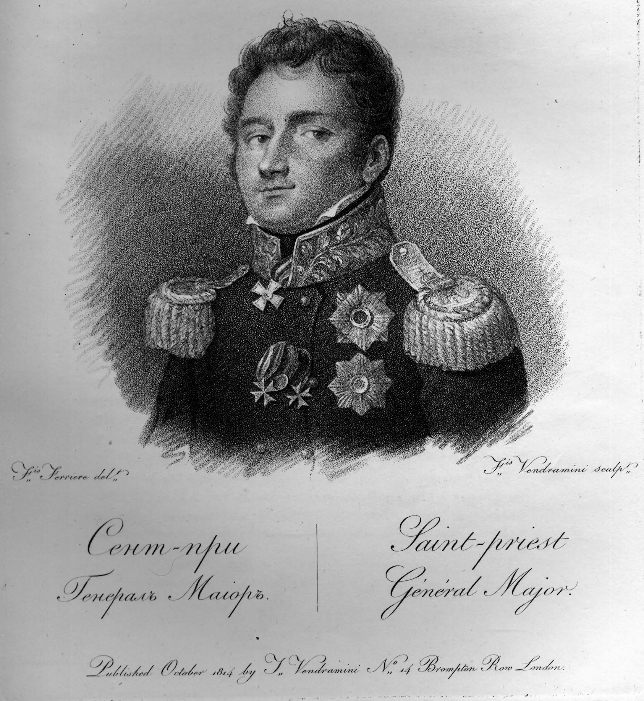 Генерал-майор Сент-При